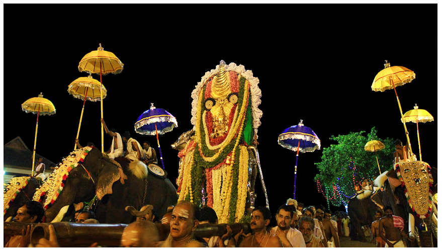 വൈക്കം പെരുംതൃക്കോവിലപ്പന്റെ അഷ്ടമി എഴുന്നള്ളത്ത്